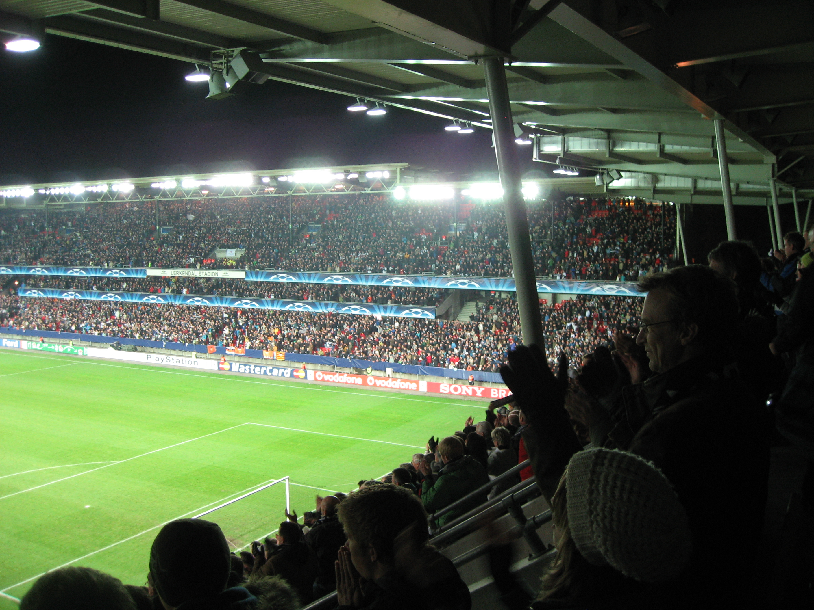 RBK - Valencia (2-0, 24/10/2007)